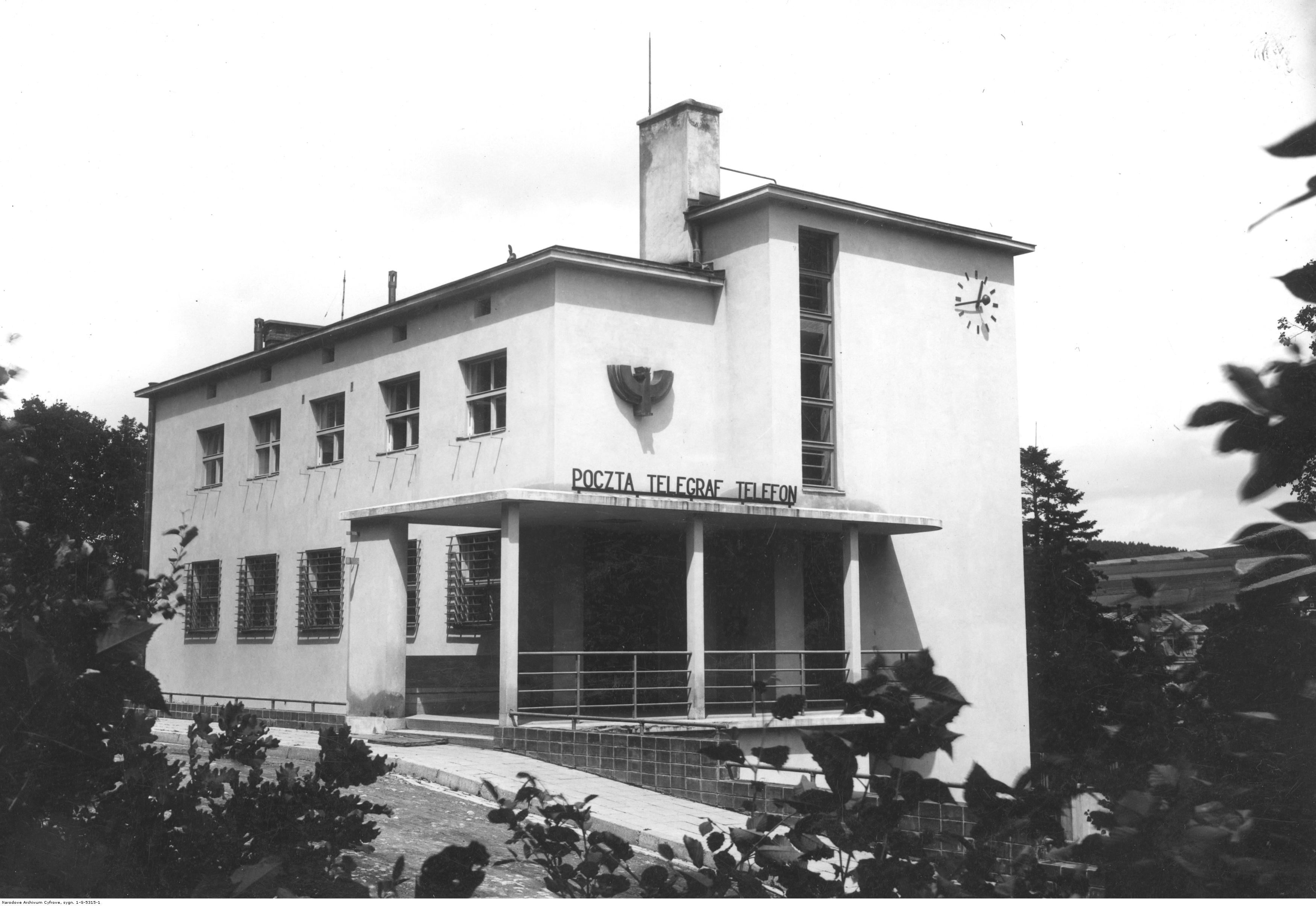 Urząd pocztowy w Iwoniczu-Zdroju zaprojektowany w 1935 roku przez architektkę Wandę Boerner-Przewłocką